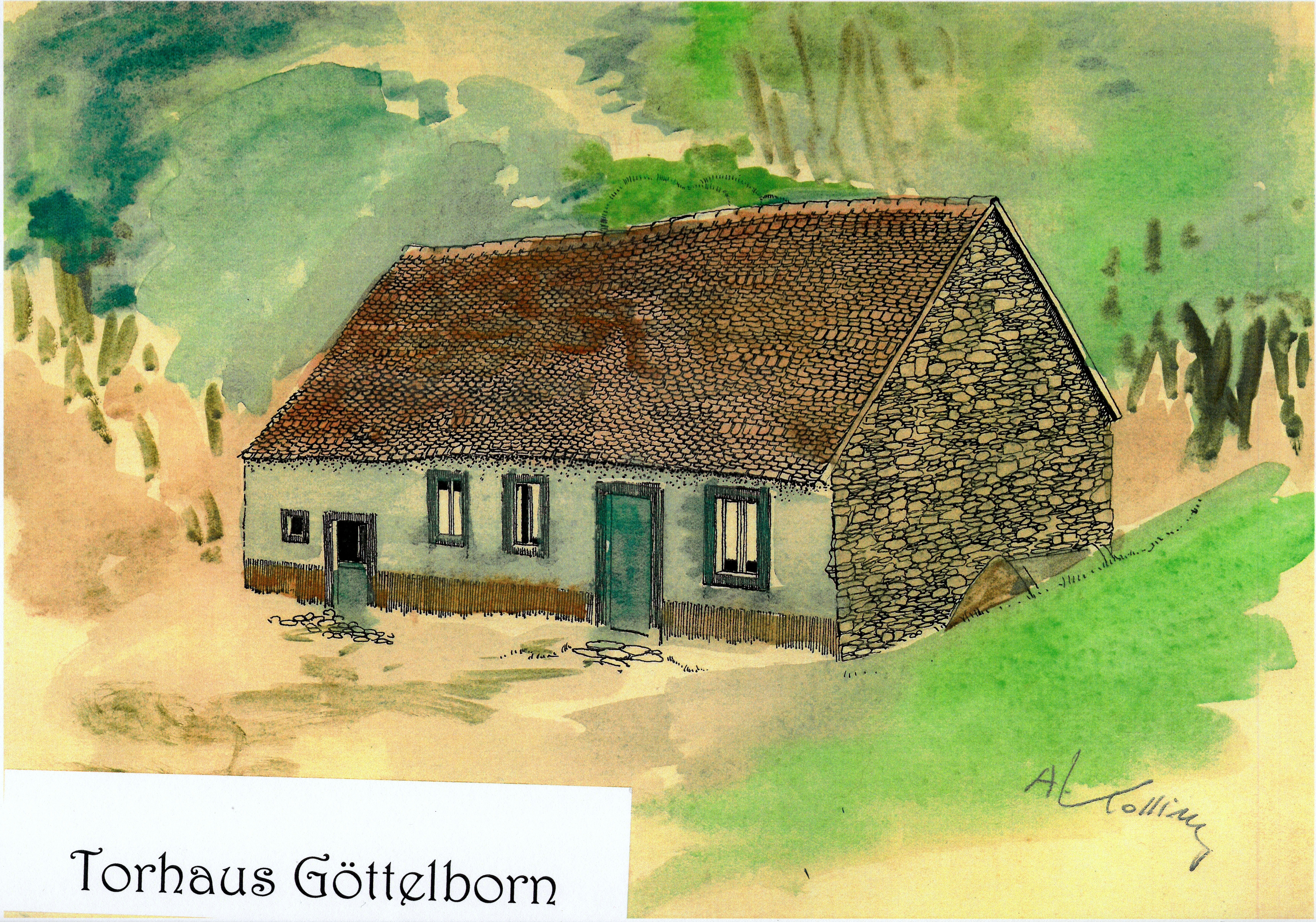 Torhaus "Matzenbauershaus" oder "Matzbauershaus" in Göttelborn. Gebaut vom Waldhüter Mathias Bauer auf einem von Fürst Heinrich Wilhelm kostenlos zur Verfügung gestelltem Grundstück. Das Haus wurde 1947 abgerissen.